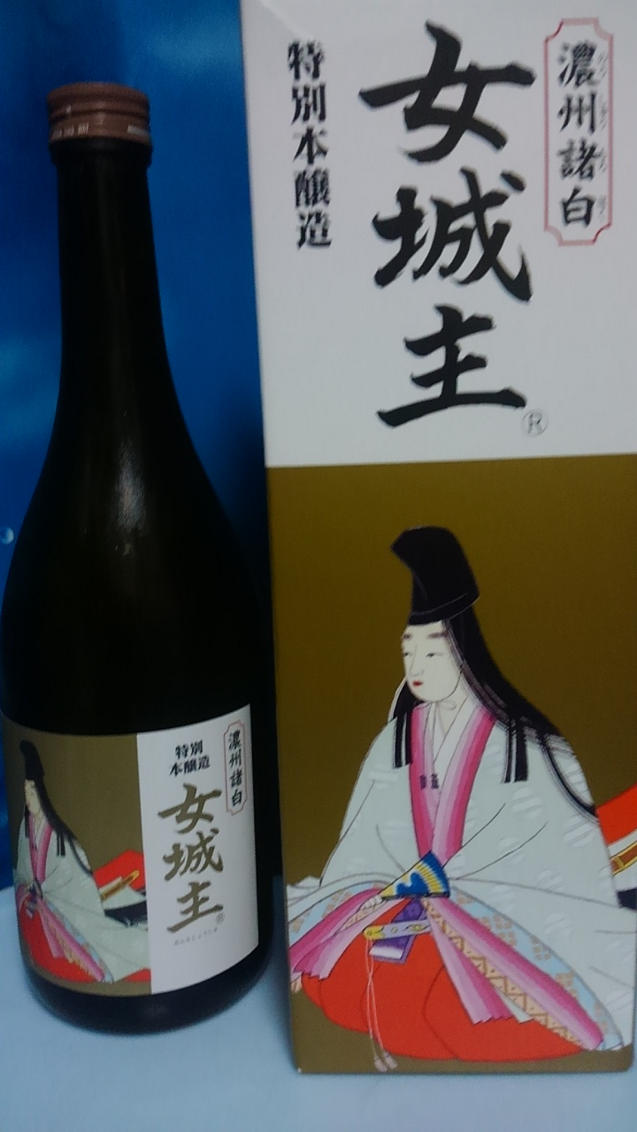 岩村醸造の女城主